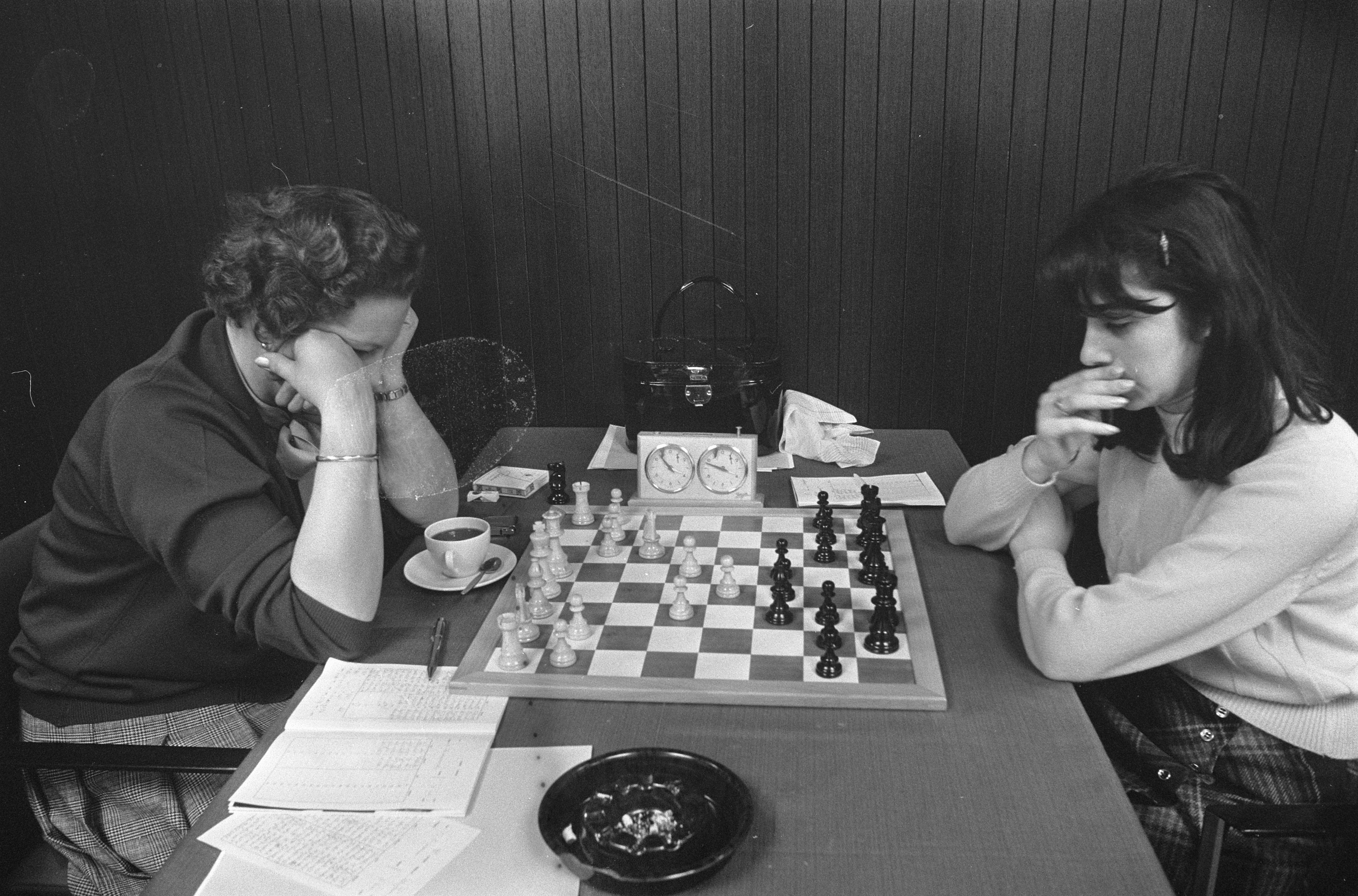 Hoogoven Schaaktoernooi in Beverwijk 1970. Nana Alexandria (rechts) en Rie Timmer (Ned) aan bord